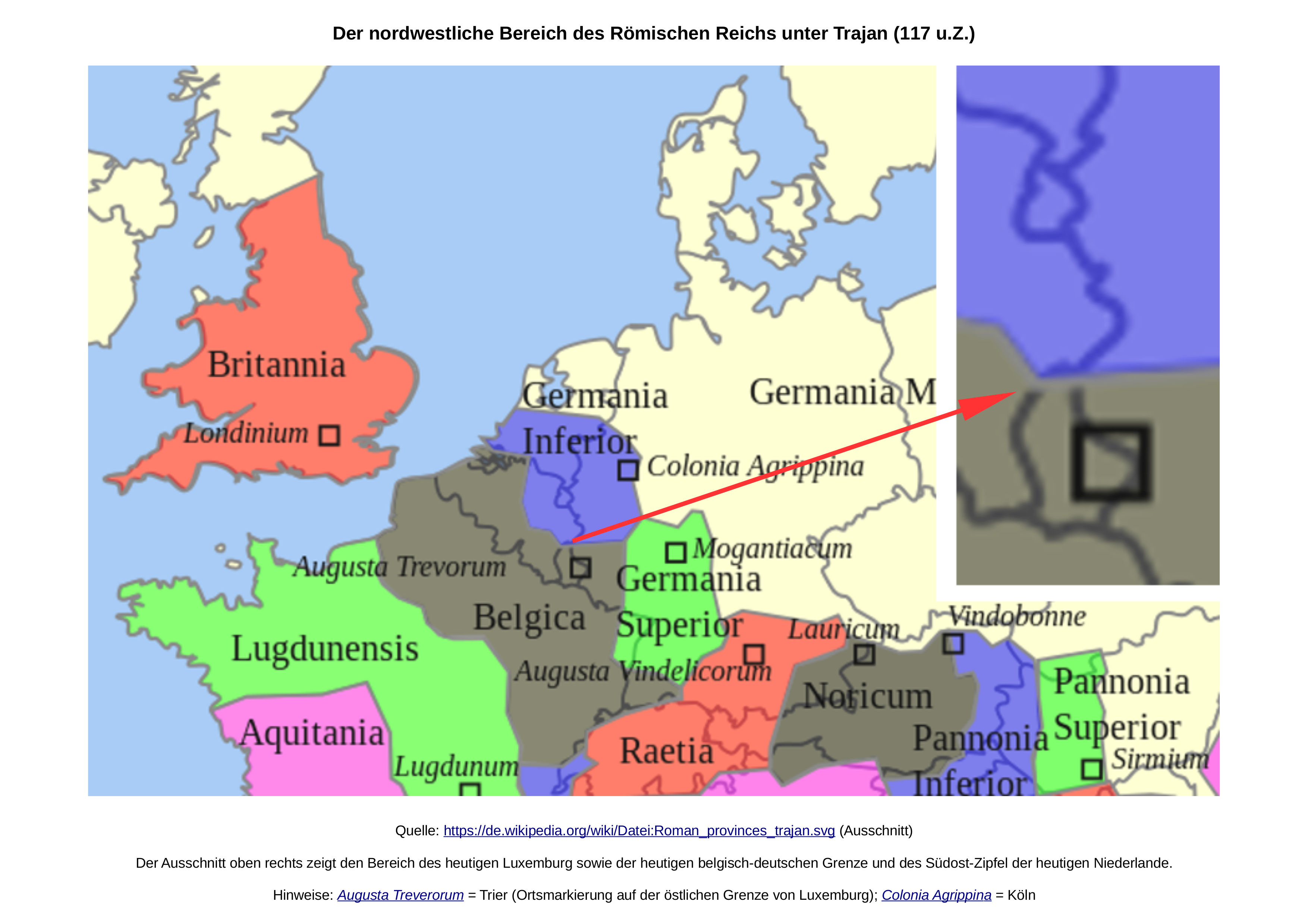 Der Ausschnitt oben rechts zeigt den Bereich des heutigen Luxemburg sowie der heutigen belgisch-deutschen Grenze und des Südost-Zipfel der heutigen Niederlande. Weitere Hinweise: Augusta Treverorum = Trier (Ortsmarkierung auf der östlichen Grenze von Luxemburg); Colonia Agrippina = Köln